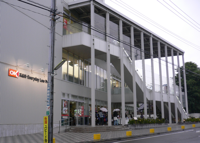 OK store Shin-Yoga store in Yoga,Setagaya, Tokyo, Japan.OKストア新用賀店（東京都世田谷区）。